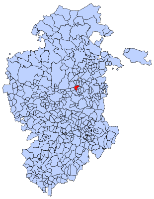 Santa María del Invierno en Burgos